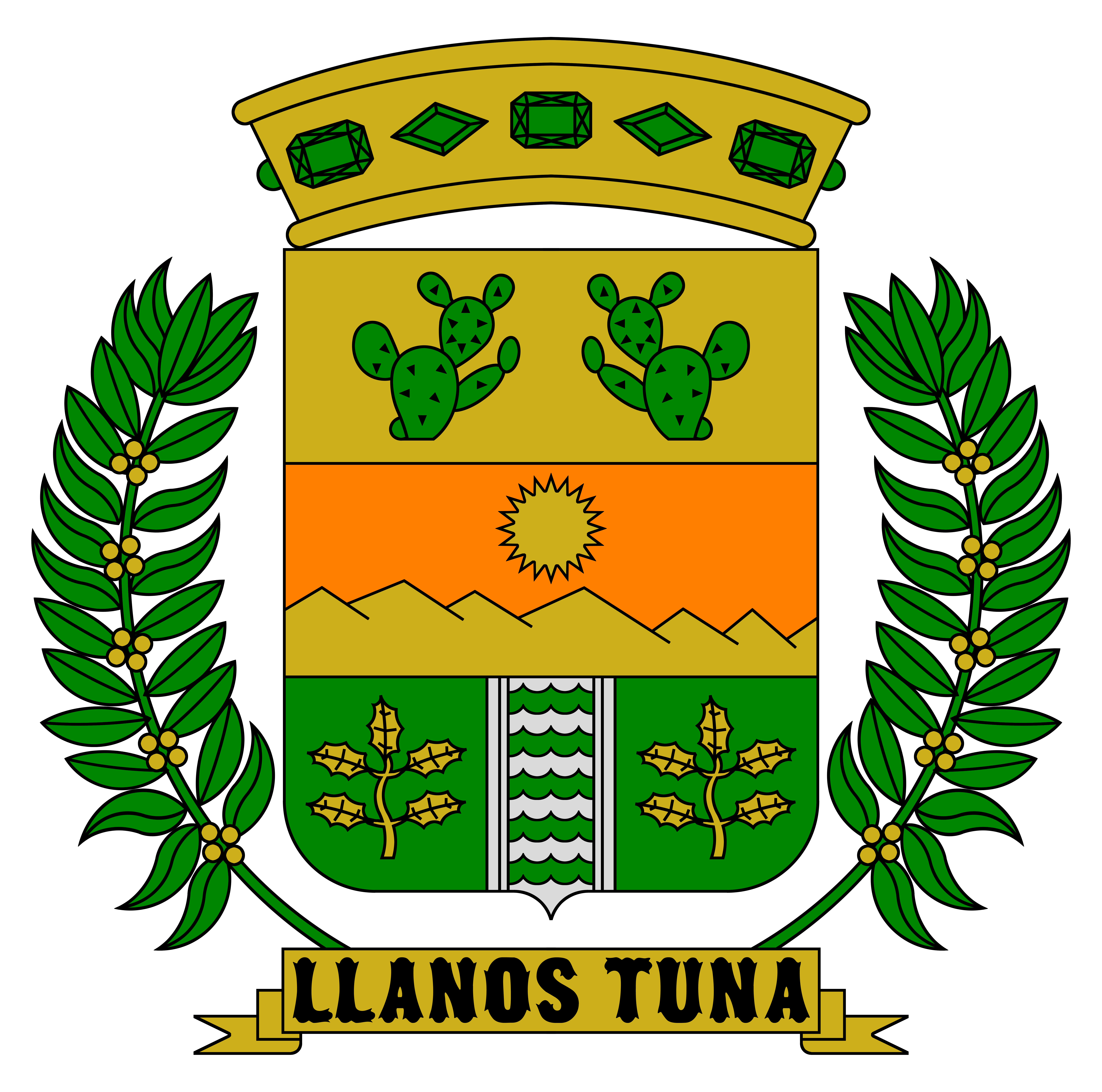 Escudo del Barrio Llanos Tuna